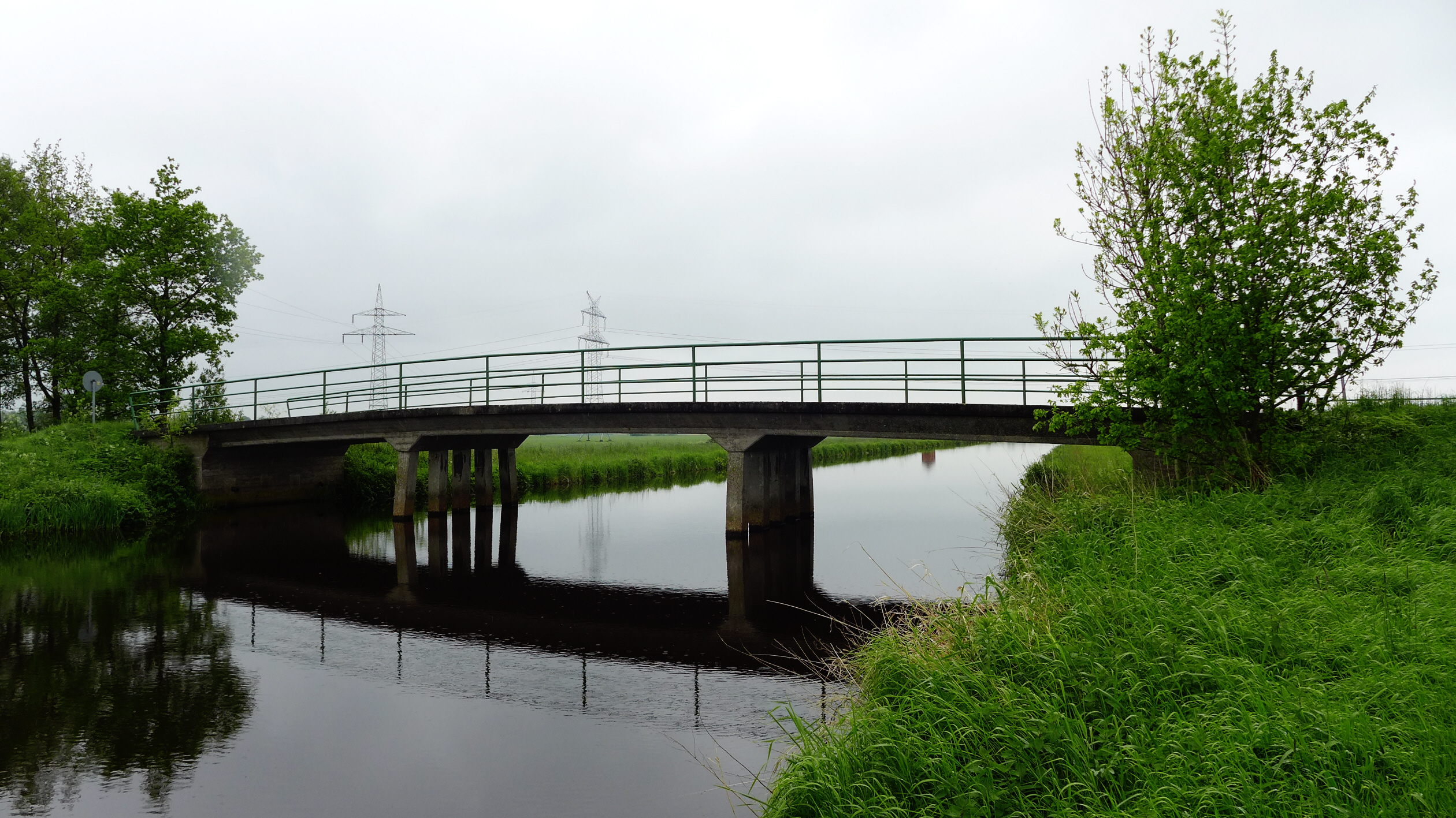 Brücke über die Mehe bei Abbenseth, einem Ortsteil der Gemeinde Hollnseth im Landkreis Cuxhaven, Niedersachsen.